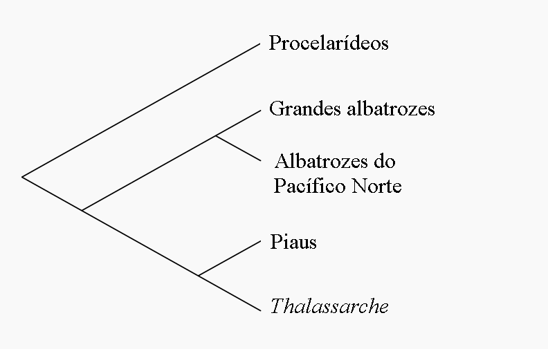 Filogenia da família de aves "Diomedeidae"